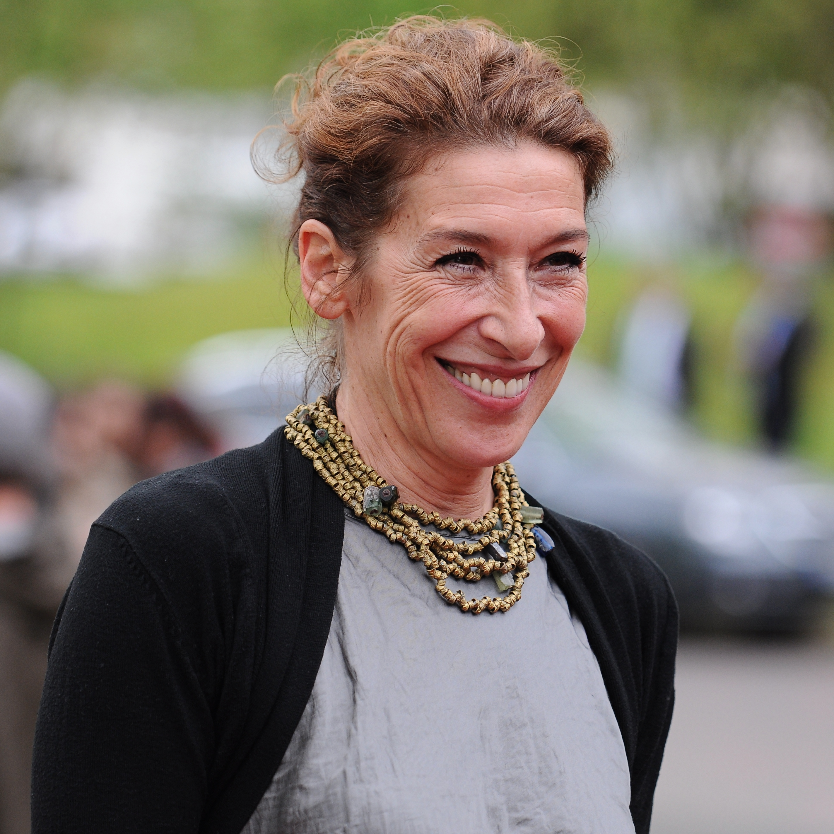 Adele Neuhauser bei der Verleihung des Grimme-Preises 2014.